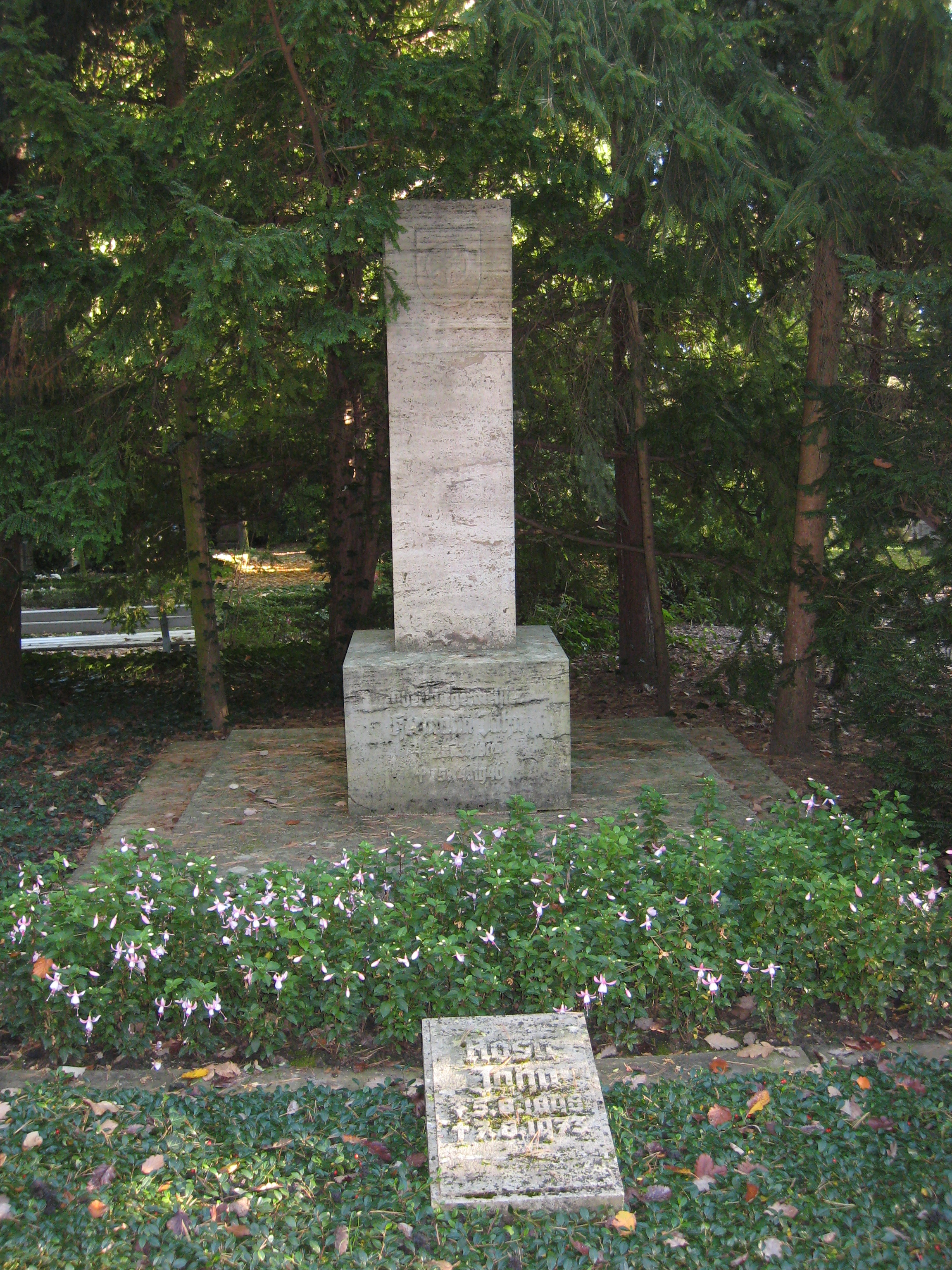 Grab des Oberbürgermeisters von Erfurt Hermann Jahn